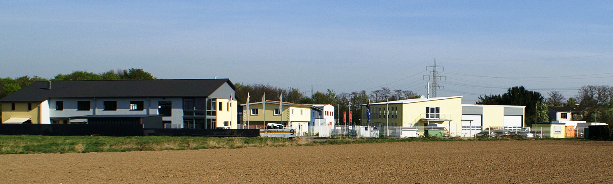 Gewerbegebiet am Herkenrathweg in Köln-Ostheim im April 2010